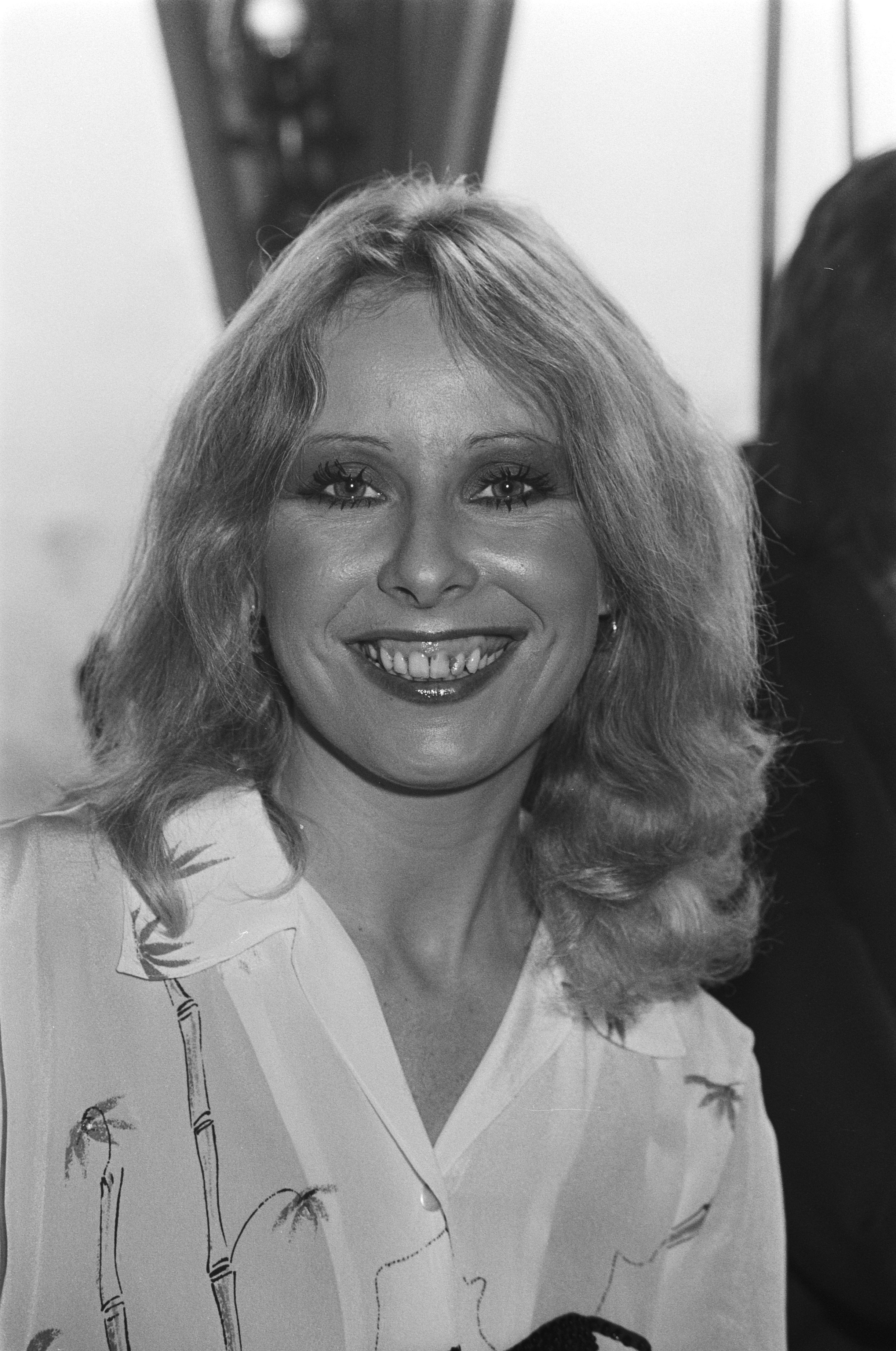 Collectie / Archief : Fotocollectie Anefo Reportage / Serie : Uitreiking "Kruiwagen" en "Conamus Export Prijs" tijdens radioprogramma Open House Beschrijving : Uitreiking "Kruiwagen" en " Export Prijs" tijdens radioprogramma Open House . Bonnie St. Claire Datum : 31 december 1981 Trefwoorden : RADIOPROGRAMMAS, Uitreikingen Fotograaf : Dijk, Hans van / Anefo Auteursrechthebbende : Nationaal Archief Materiaalsoort : Negatief (zwart/wit) Nummer archiefinventaris : bekijk toegang 2.24.01.05 Bestanddeelnummer : 931-8883